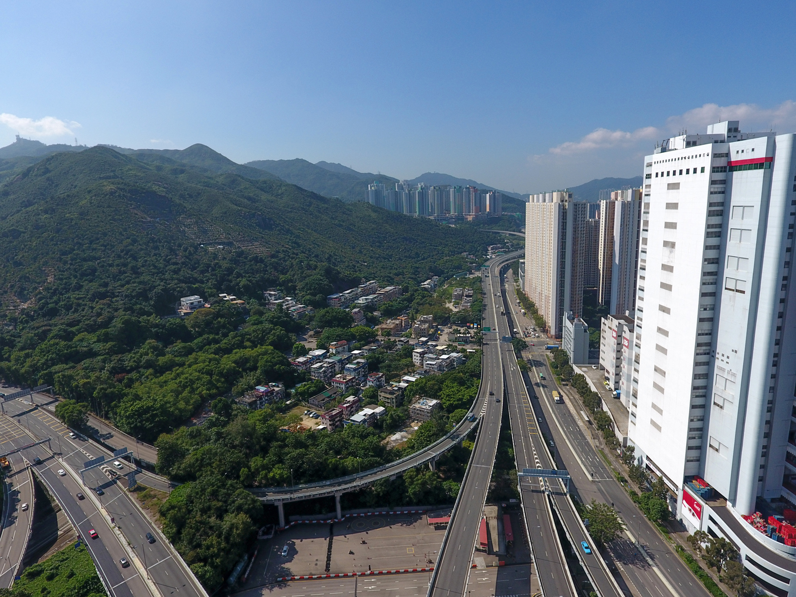 Ngau Pei Sha